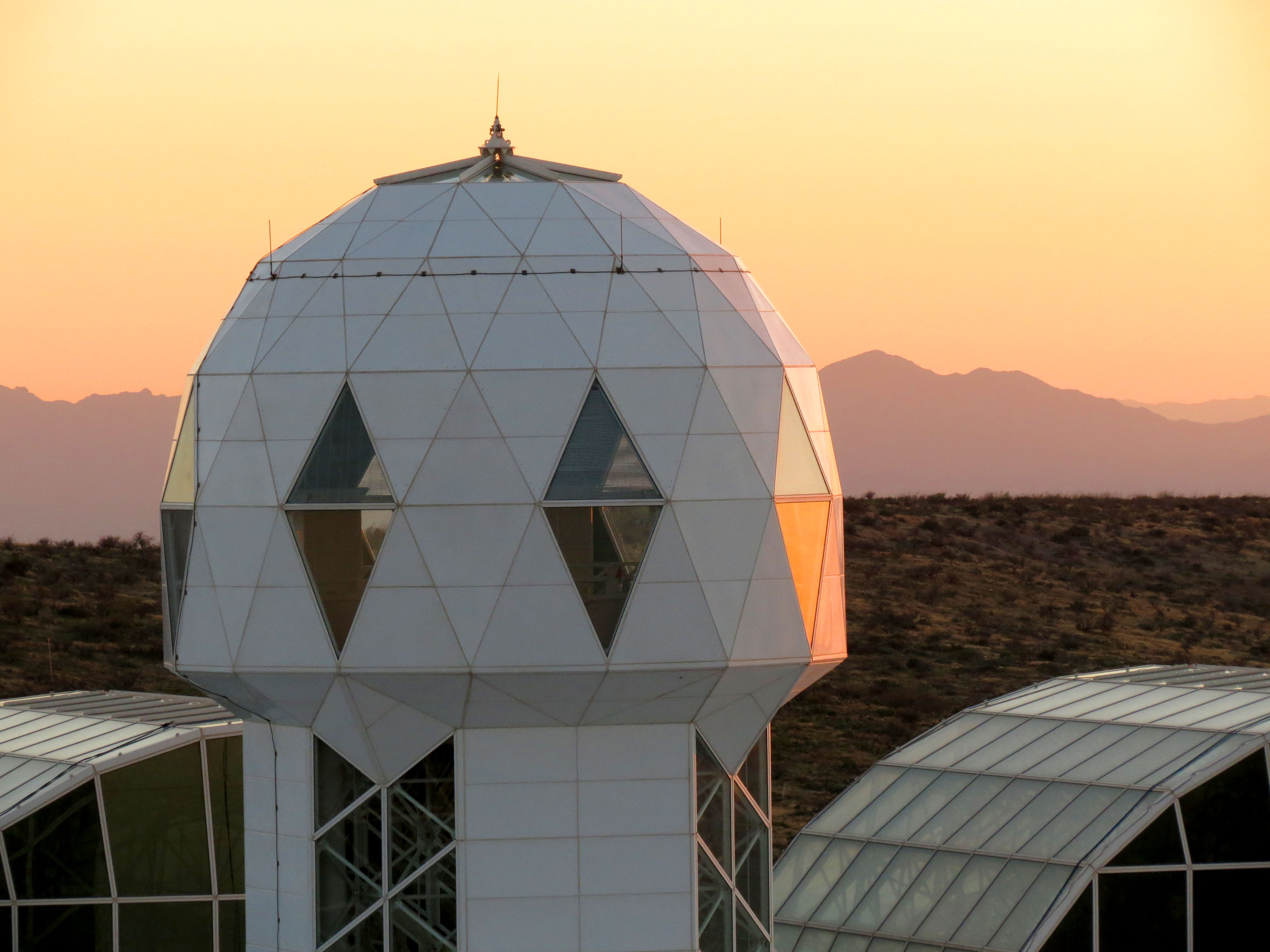 Biosphere 2, Oracle, Arizona, USA.